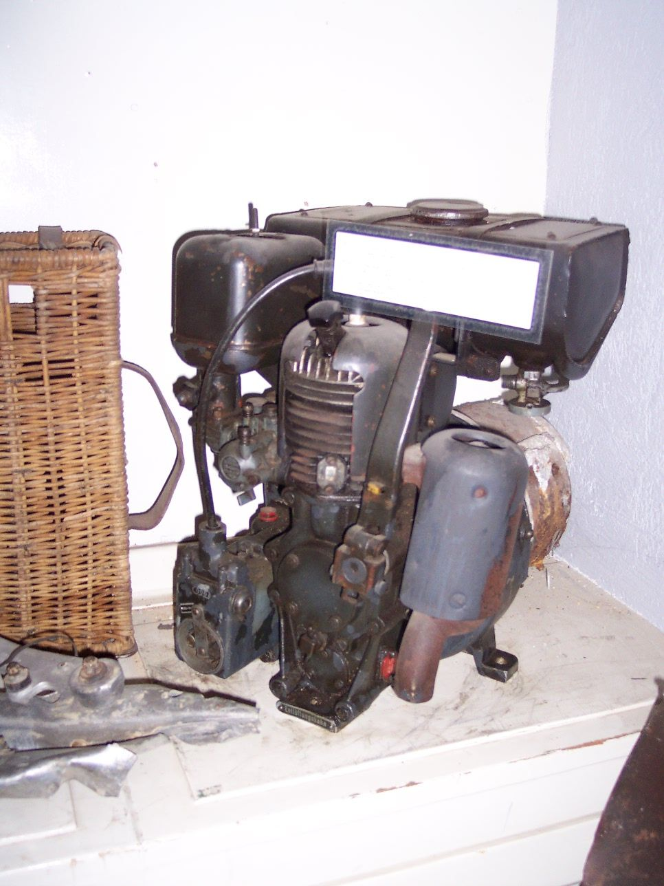 Kleiner Stromerzeuger aus dem 2. Weltkrieg